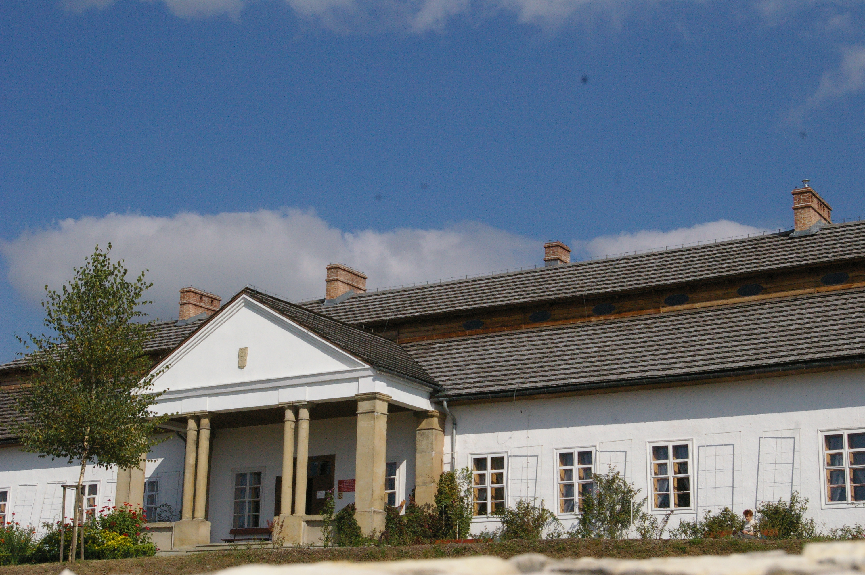 VIII Małopolskie Dni Dziedzictwa Kulturowego. XIV Małopolskie Dni Dziedzictwa Kulturowego